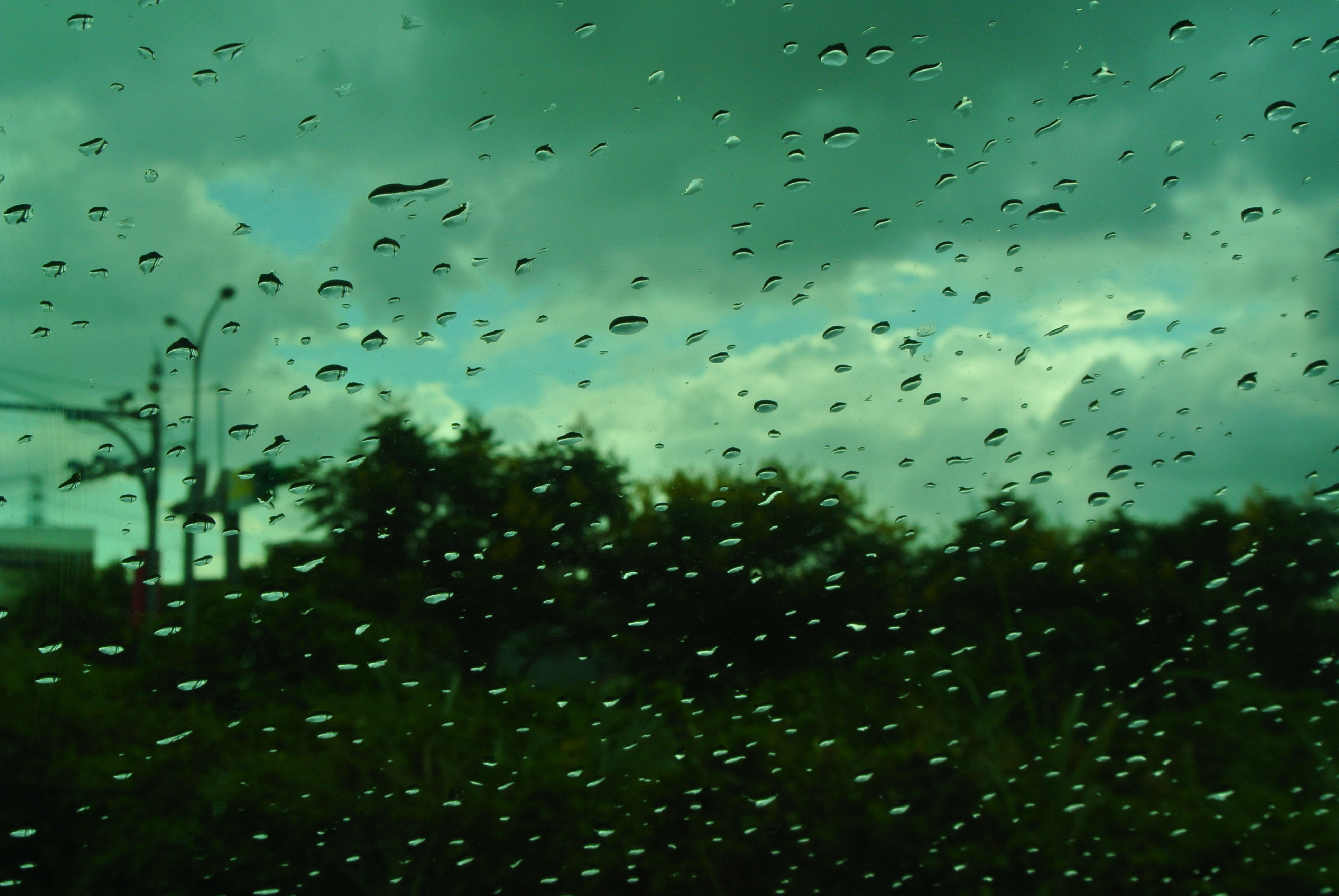 喜歡從雨滴裡看世界 似而模糊 似而清晰 模糊的令人有多份假想空間 清晰的令人一眼看清標的物 每個不同角度的雨滴 有如站在不同層面的人們 一個雨滴~~ 一種心情~~ 一片風景~~ 造就了一個世界